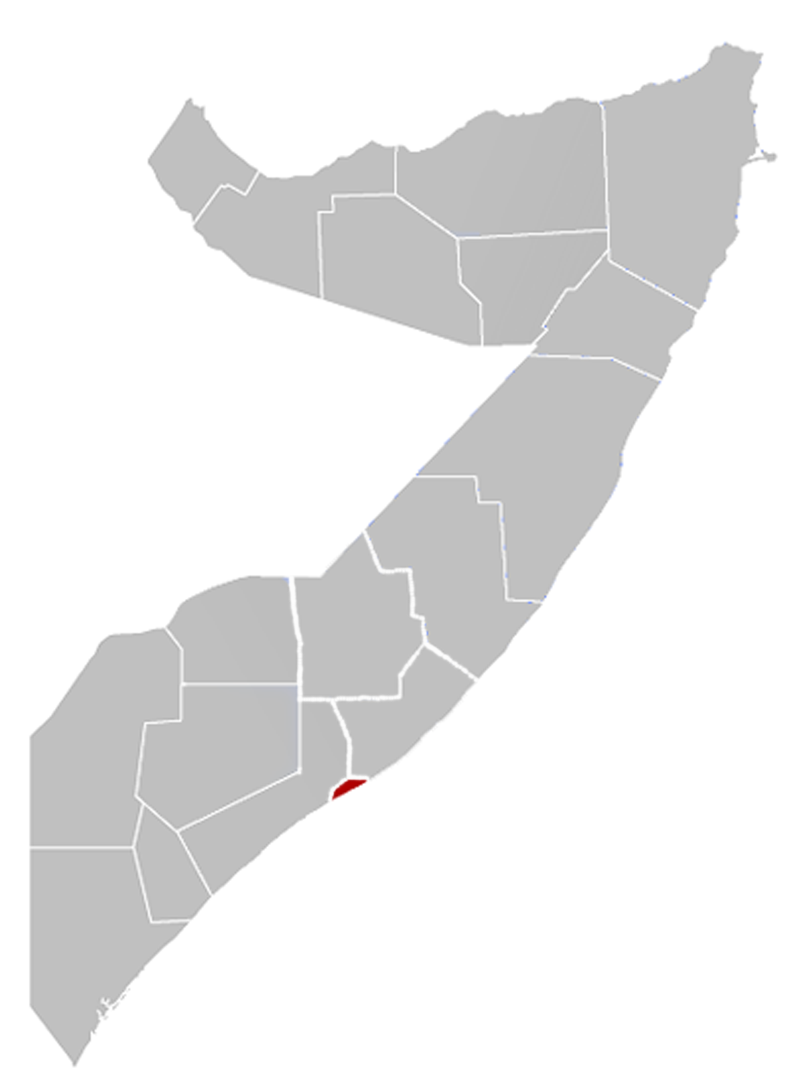 Lage der Region Benadir/Banaadir in Somalia